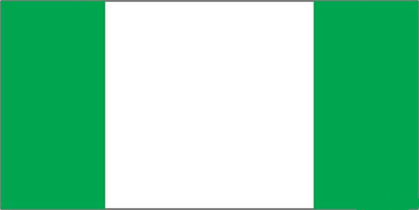 Isle of Wight rebel green flag.